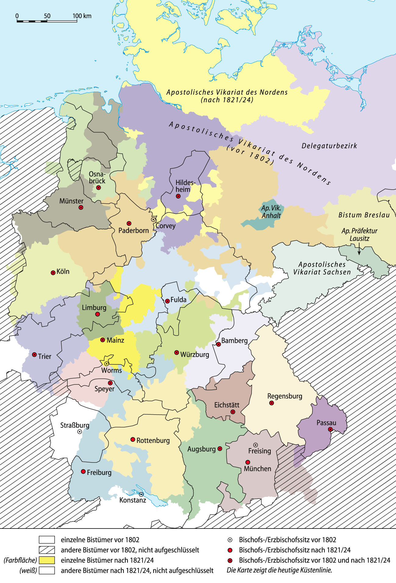 Karte der Neuumschreibung der katholischen Diözesen in Deutschland nach dem Wiener Kongress